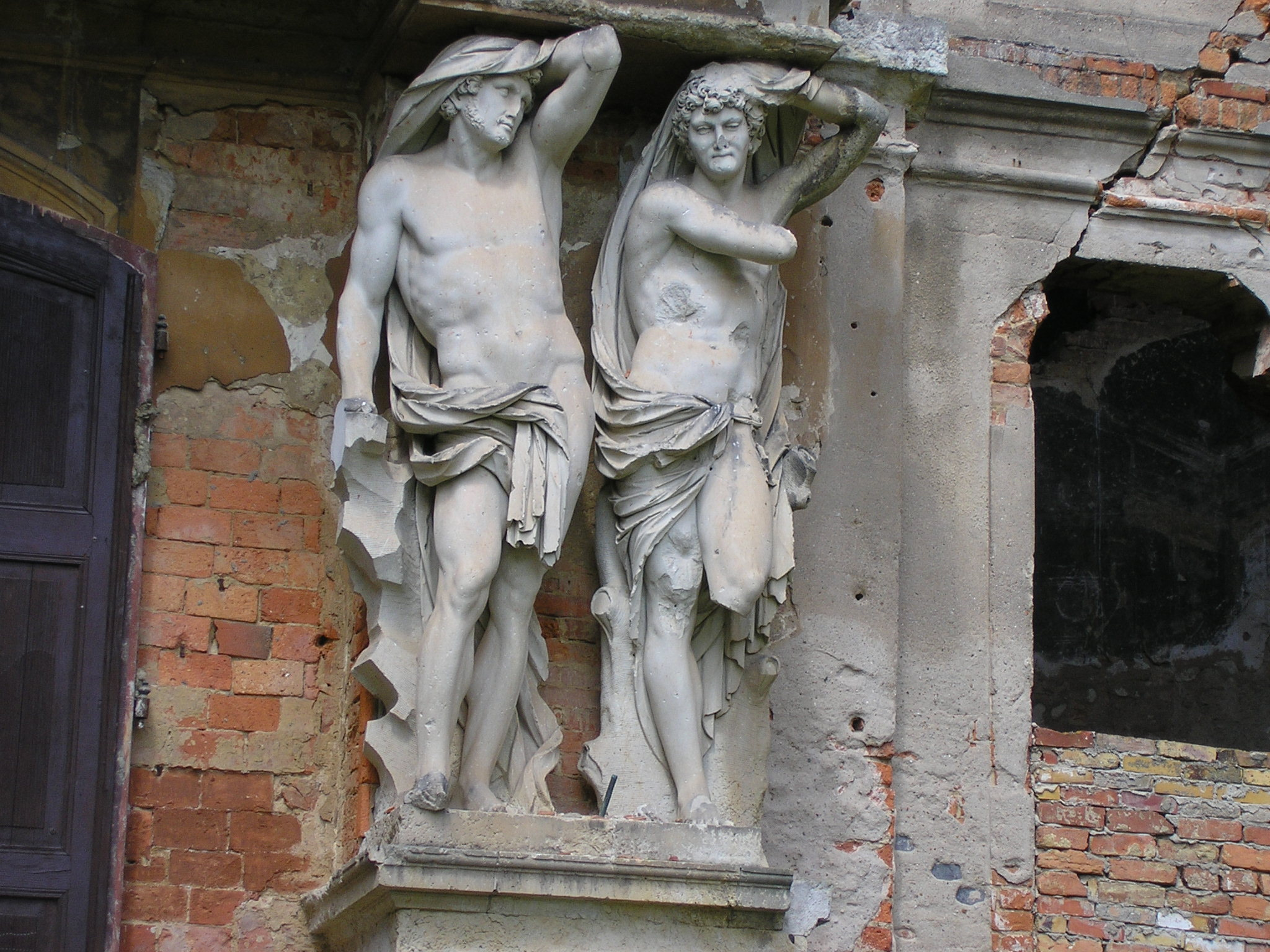 Rzeźby w pałacu w Brodach.